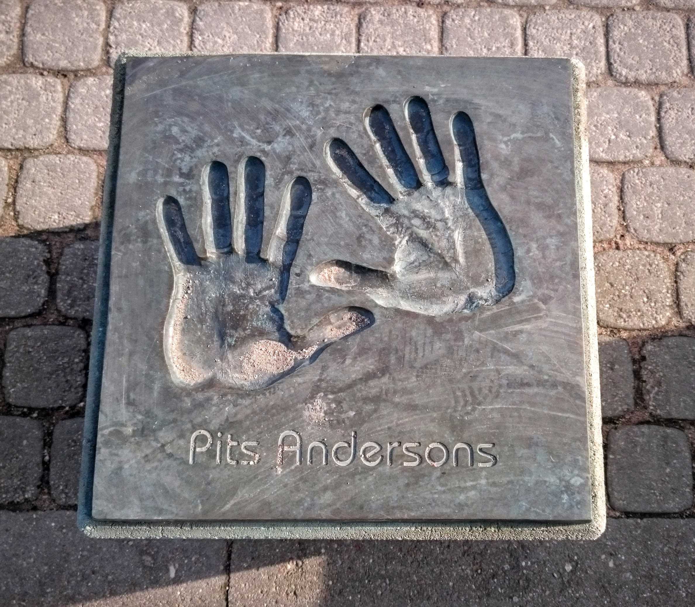 Pits Andersons, plaukstu nospiedumi Latvijas mūziķu Slavas alejā